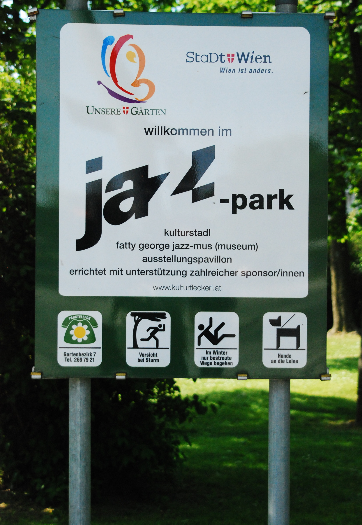 Jazz-Park: Tafel in Wien-Donaustadt